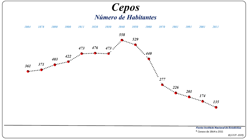 População